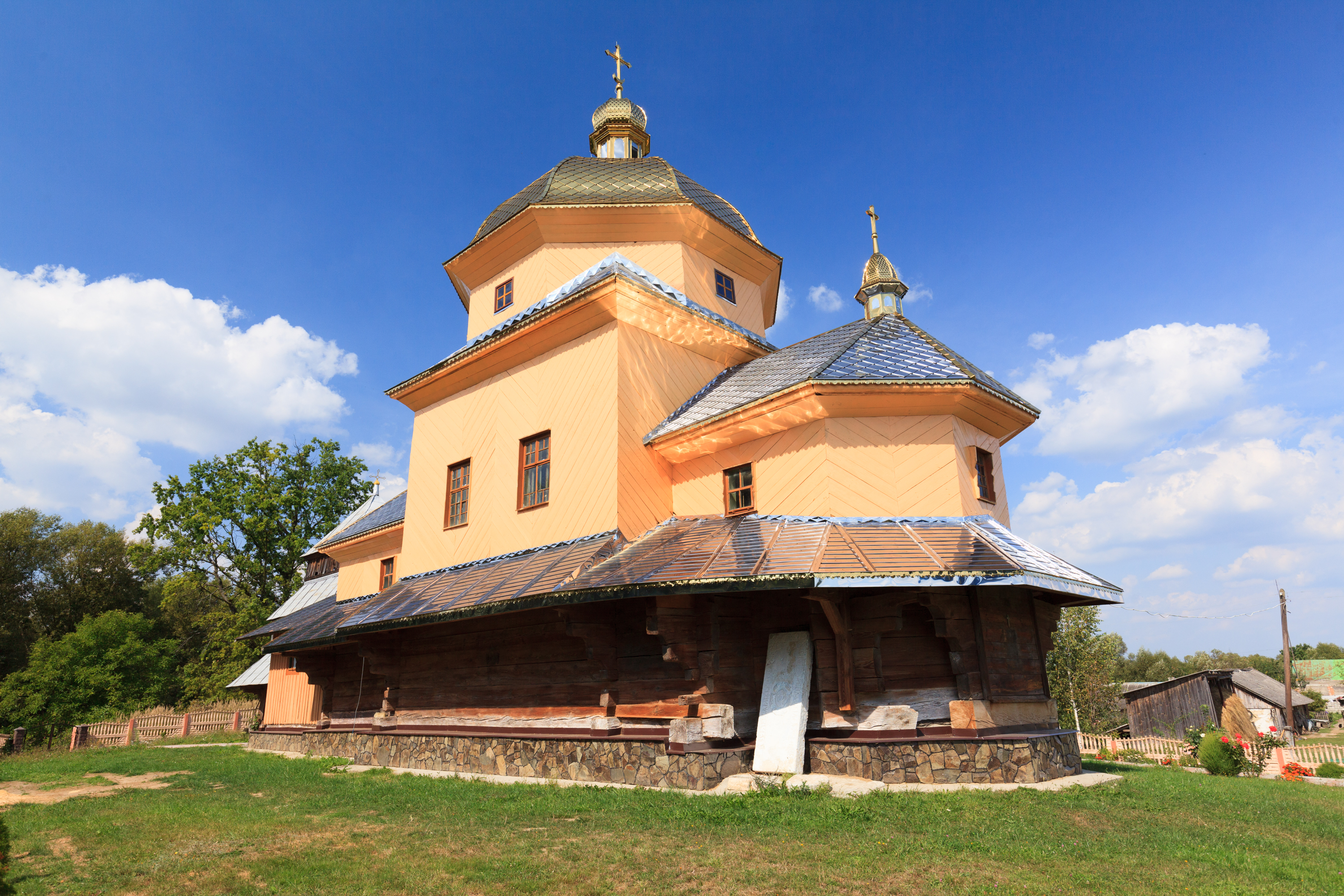 Церква Св.Михаїла (дер.), с.Грушів